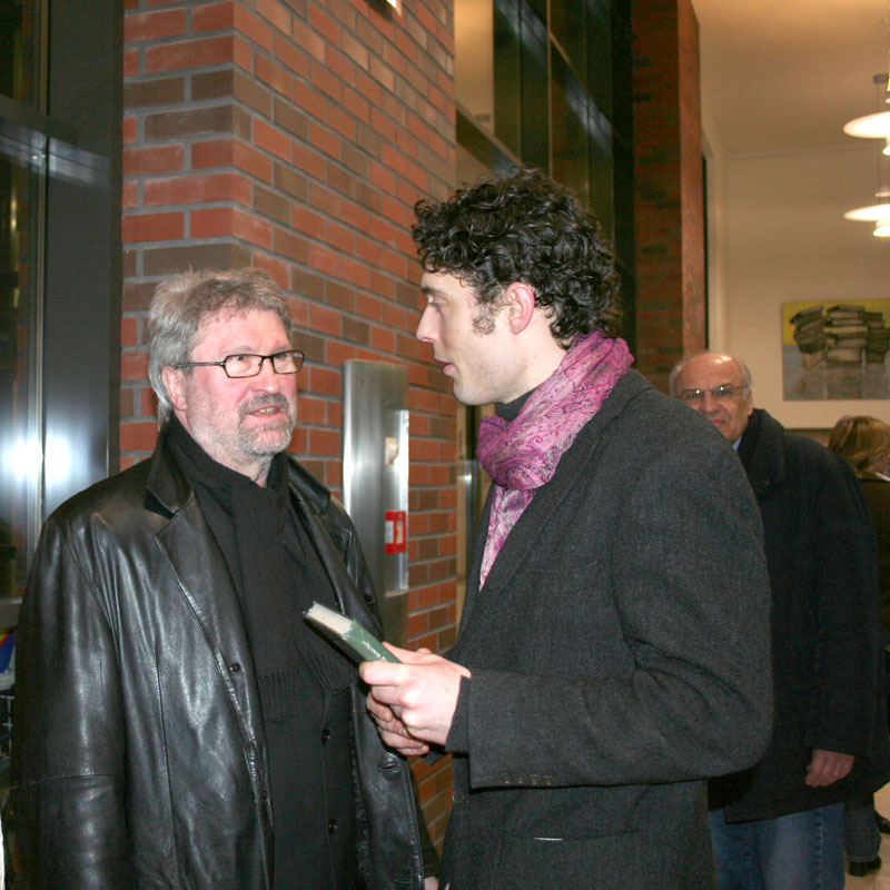 Hans-Hendrik Grimmling und Leonard Gronau im Gespräch